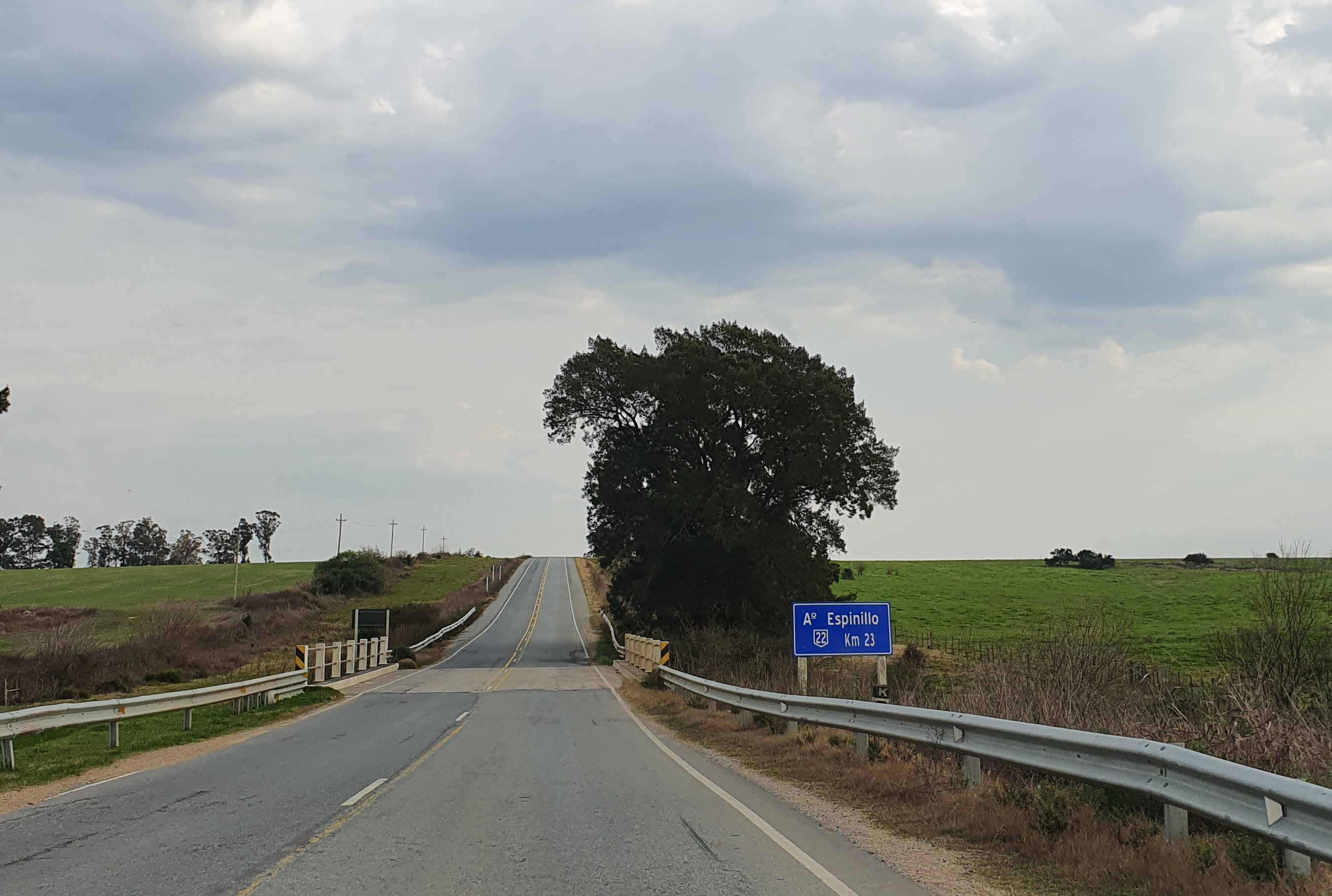 Ruta 22 km 23 Uruguay.